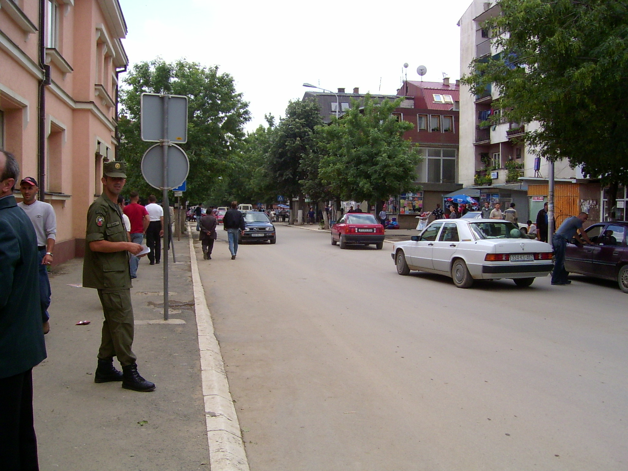 Rruga Zahir Pajaziti in Podujevo. Hauptstraße, welche durch den Ort von Ost nach West an der alten jugoslawischen Post, dem UNMIK Zollterminal zum Hotel Besianë führt